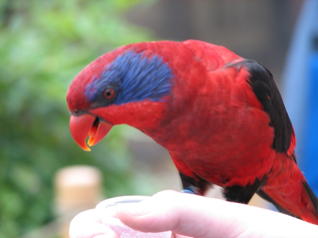 Black Winged Lorikeet